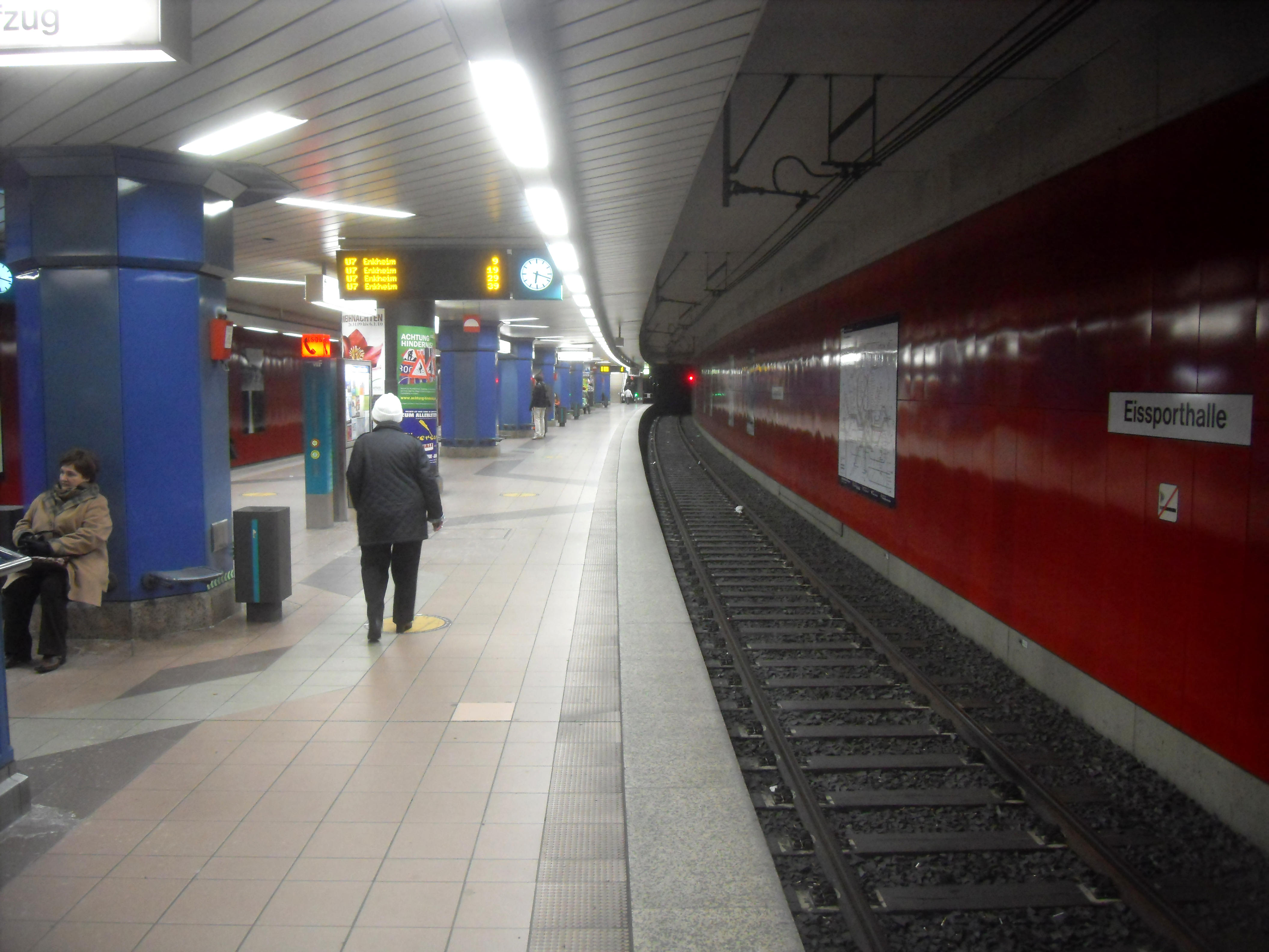 Bahnsteig des U-Bahnhofs Eissporthalle (Richtung Frankfurt-Bergen-Enkheim) der U-Bahn Frankfurt auf der Linie U 7 in Hessen (Deutschland)